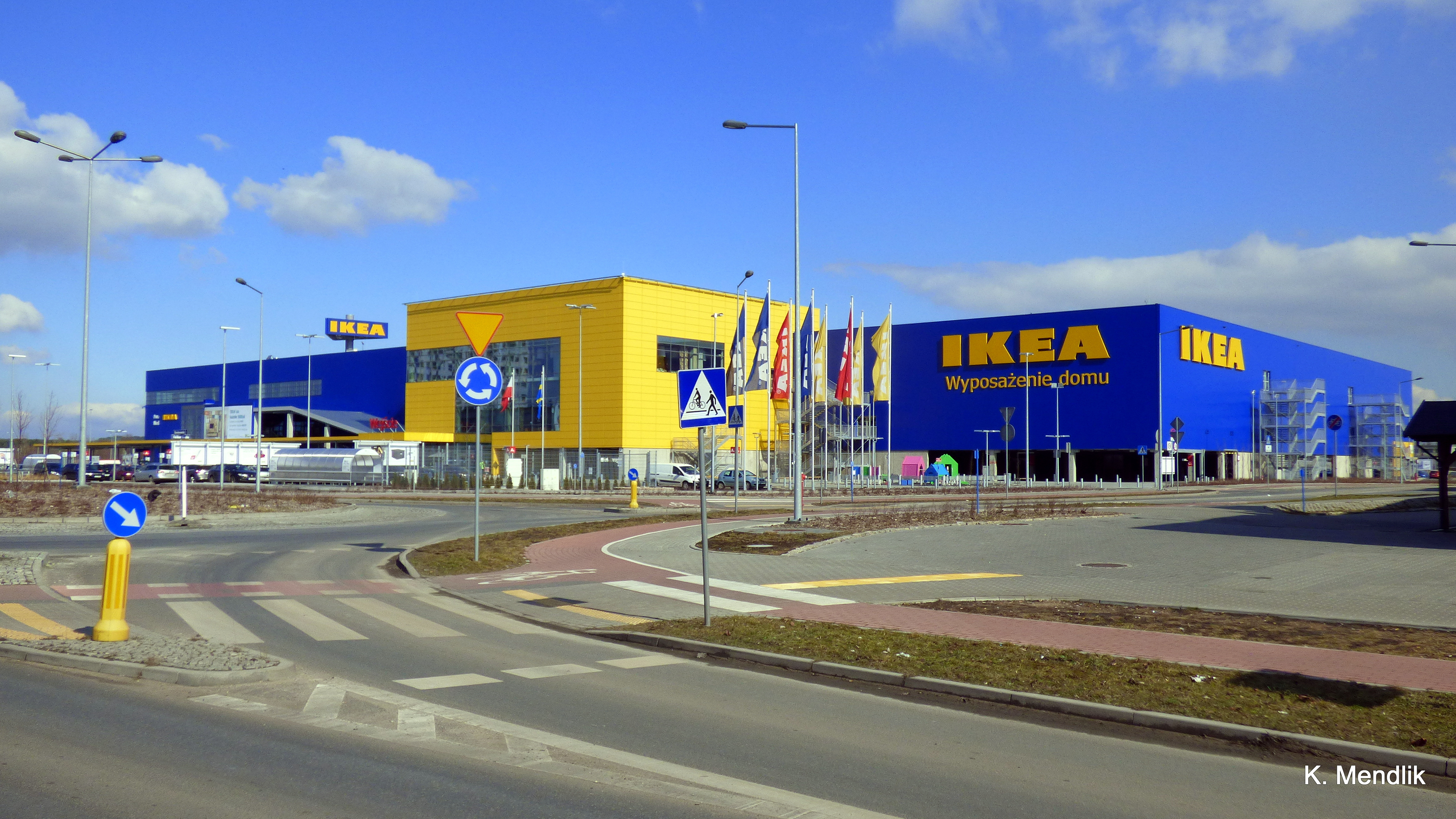 IKEA -Widok z ulicy Skandynawskiej w Bydgoszczy